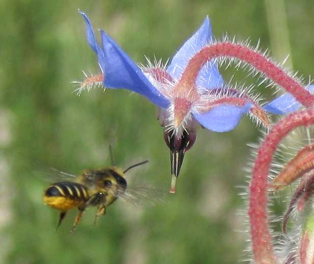 Blattschneiderbiene an Boretsch